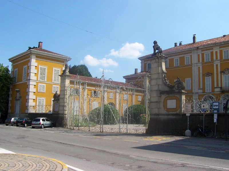 Pessano con Bornago - Villa Castiglioni